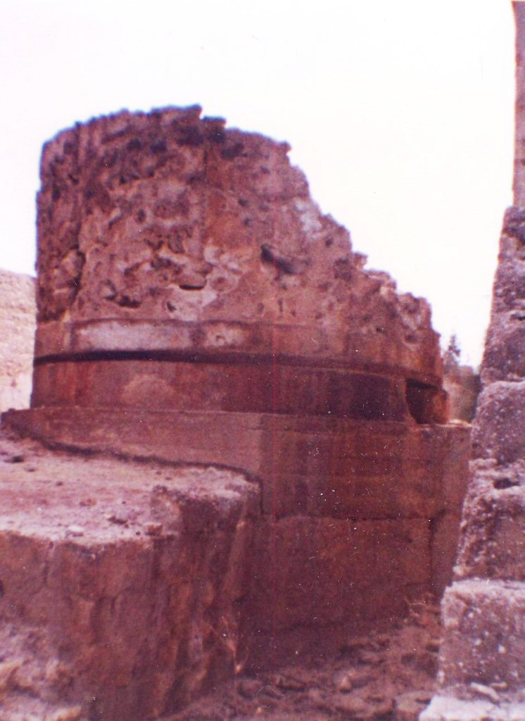 כבשן הגופרית